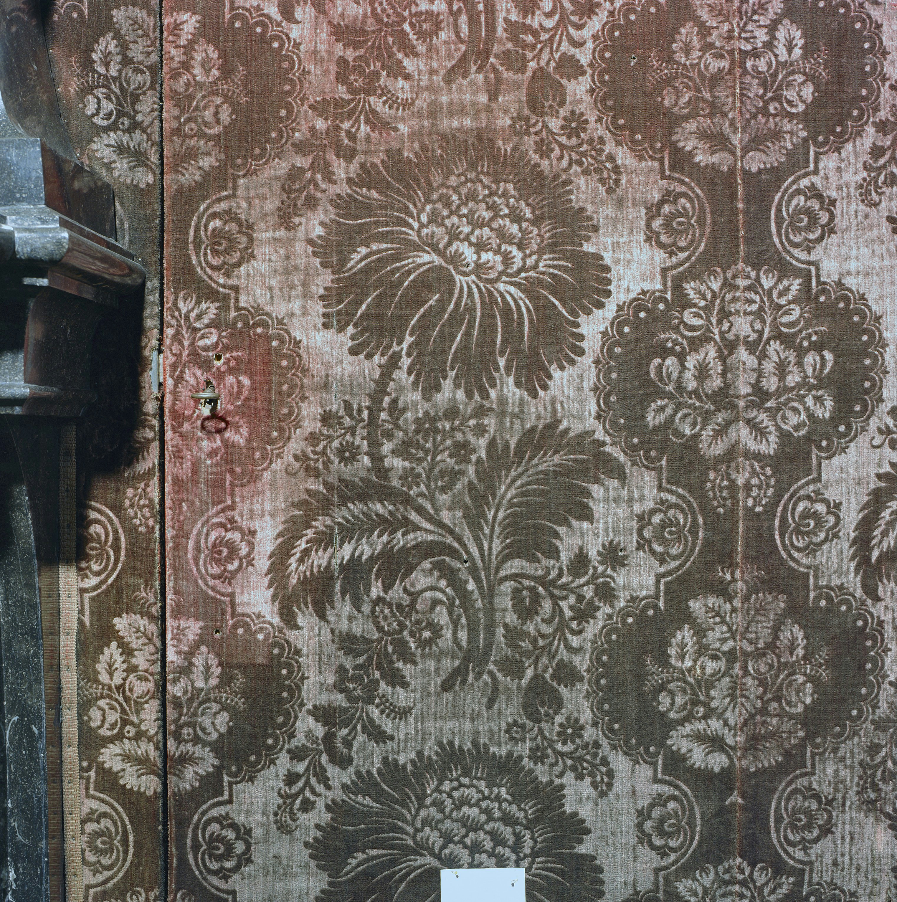 Snouck van Loosenhuis: Interieur, rechter voorkamer, detail velours d'Utrecht